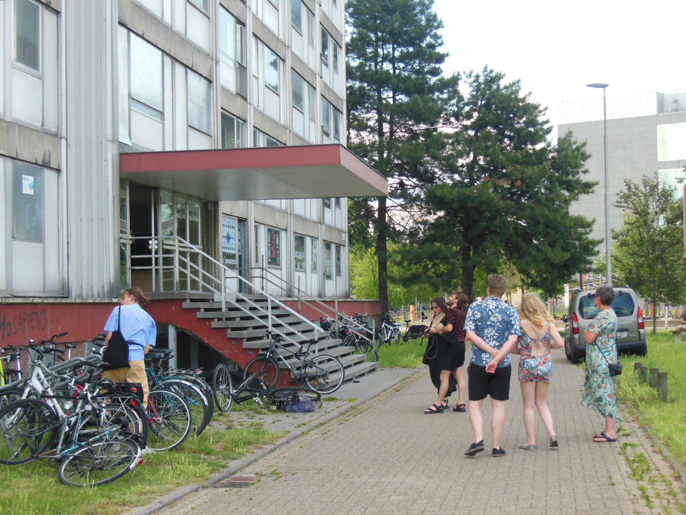 De ingang van een torenhoog leegstaand flatgebouw, op 2 juni 2019 en bezoekers aan een kunsttentoonstelling met als thema de vroegere bewoners